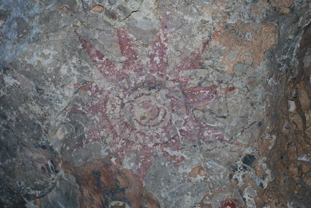 Höhlenmalerei in Lene Hara